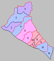 北海道浦河支庁の町村。